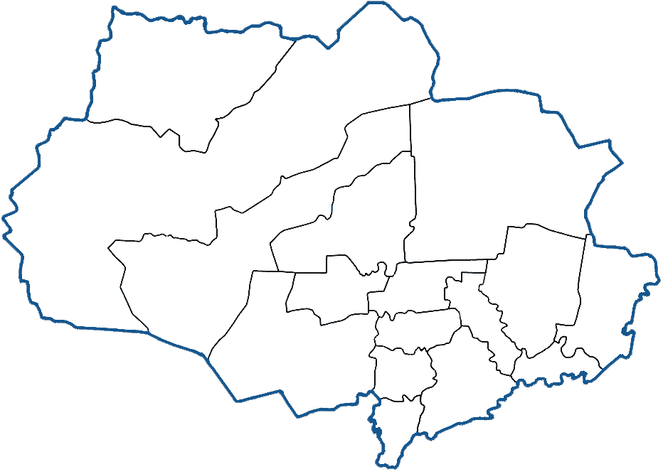 Blank map of Tomsk oblast, Russia